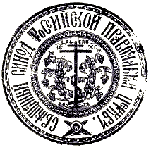 Печать на письме-соболезновании митрополита Евдокима (Мещерского) М. И. Калинину по случаю смерти В. И. Ленина. 23 января 1924 г.